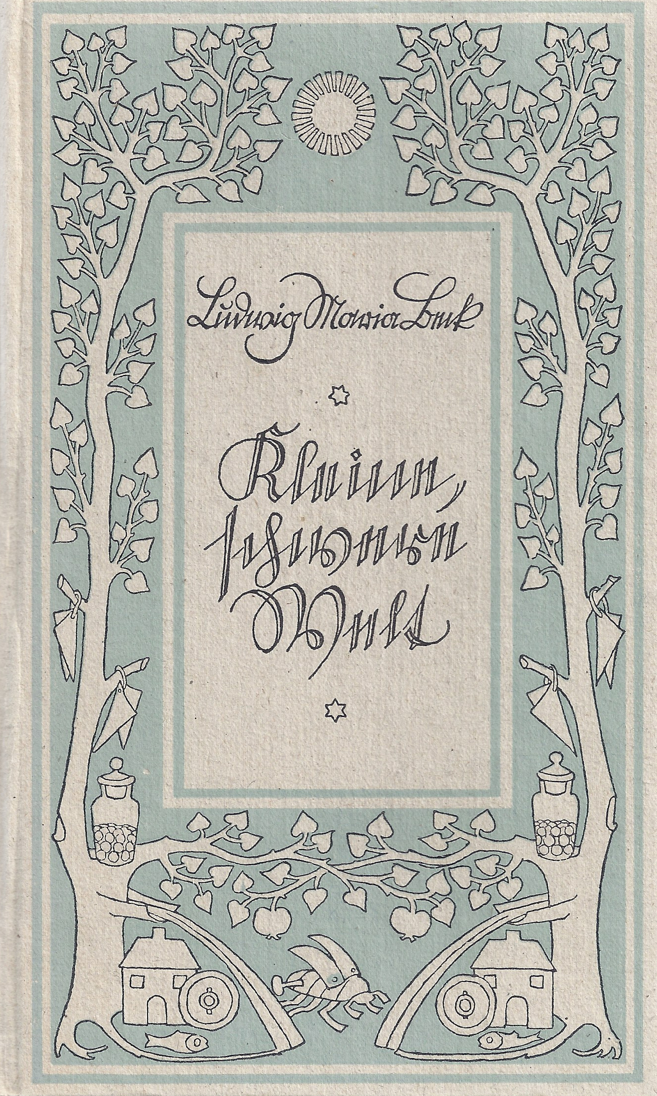 Ludwig Maria Beck, Kleine schwere Welt. 4. Auflage 1948. Umschaggestaltung von L.M. Beck. Verlegt von meinem Vater Erich Wewel